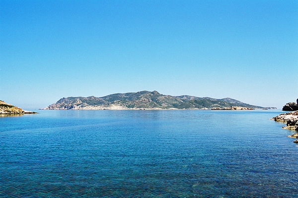 Titel: Poliegos (onbewoond) Locatie: Kimolos, Griekenland Datum: juni 2003 Fotograaf: Gebruiker:IMFJ